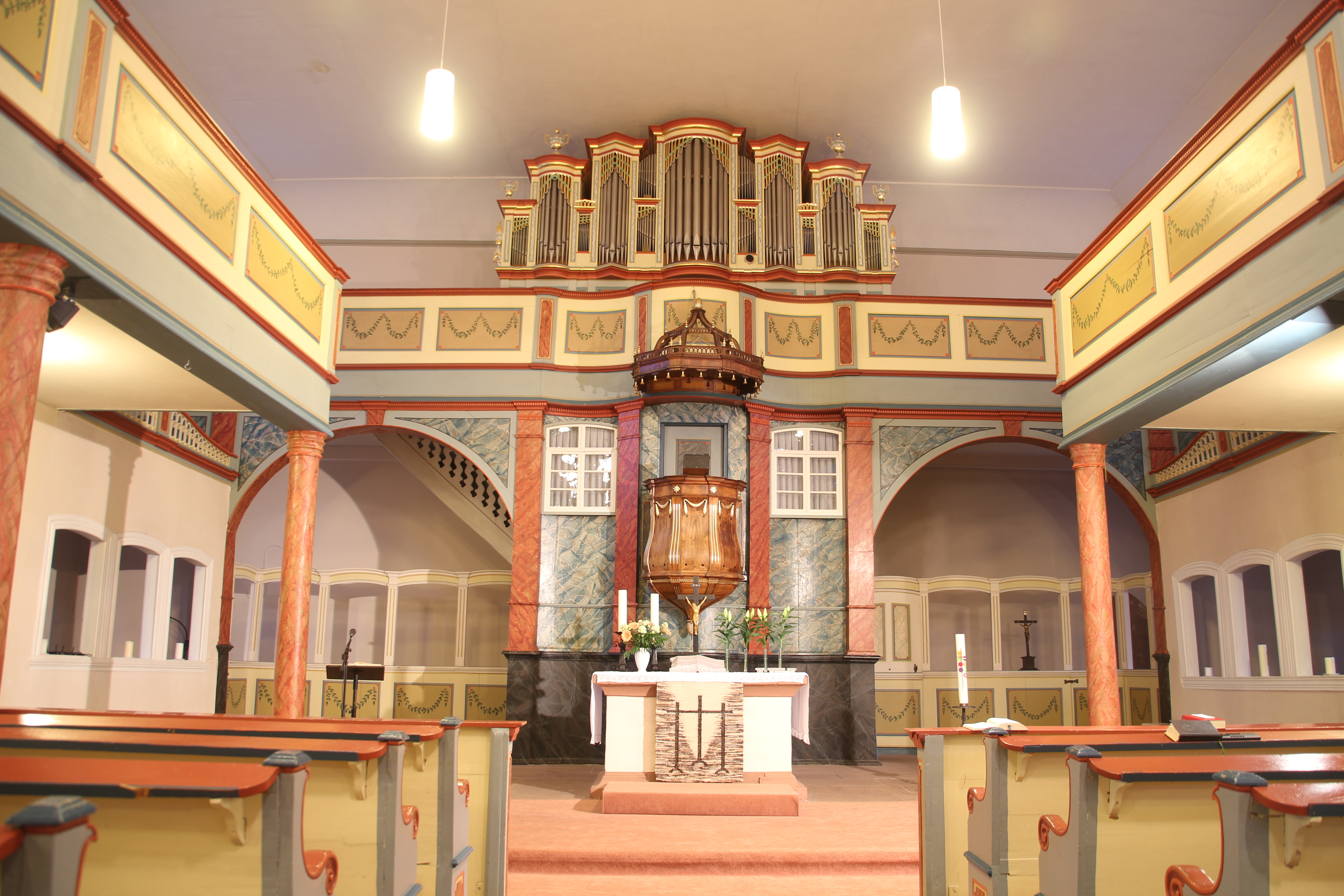 Evangelische Kirche Ober-Ohmen, Vogelsbergkreis, Hessen